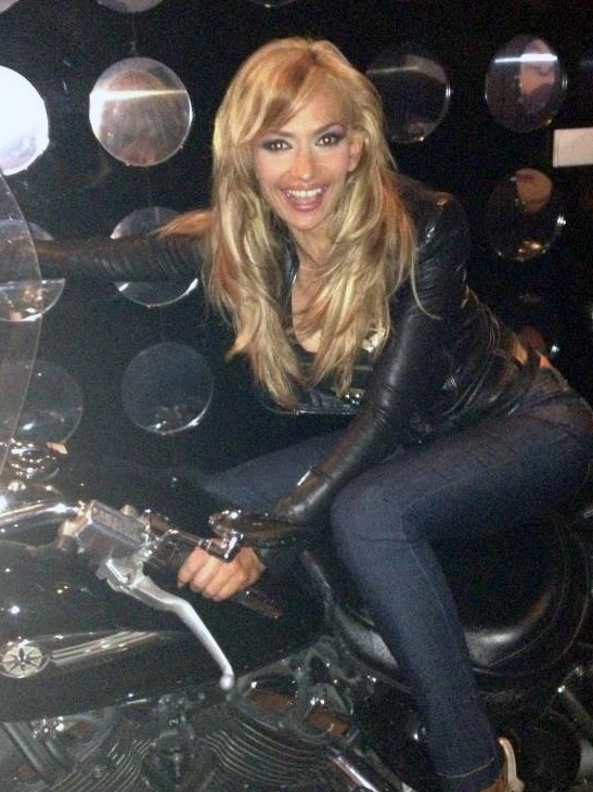 Малина